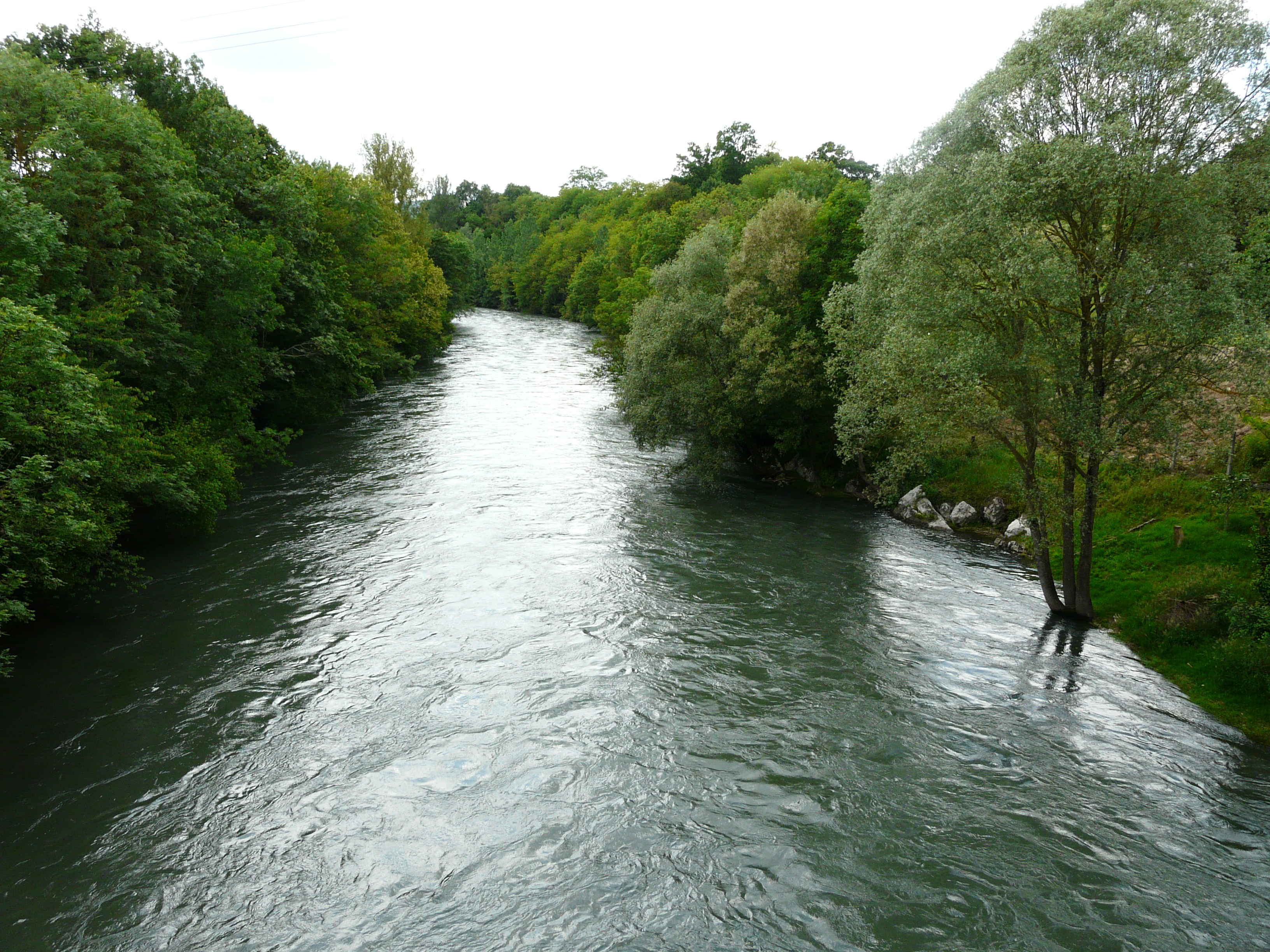 La Garonne en aval du pont de la route nationale 125, en limites de Valcabrère (à gauche) et Labroquère (à droite), Haute-Garonne, France.